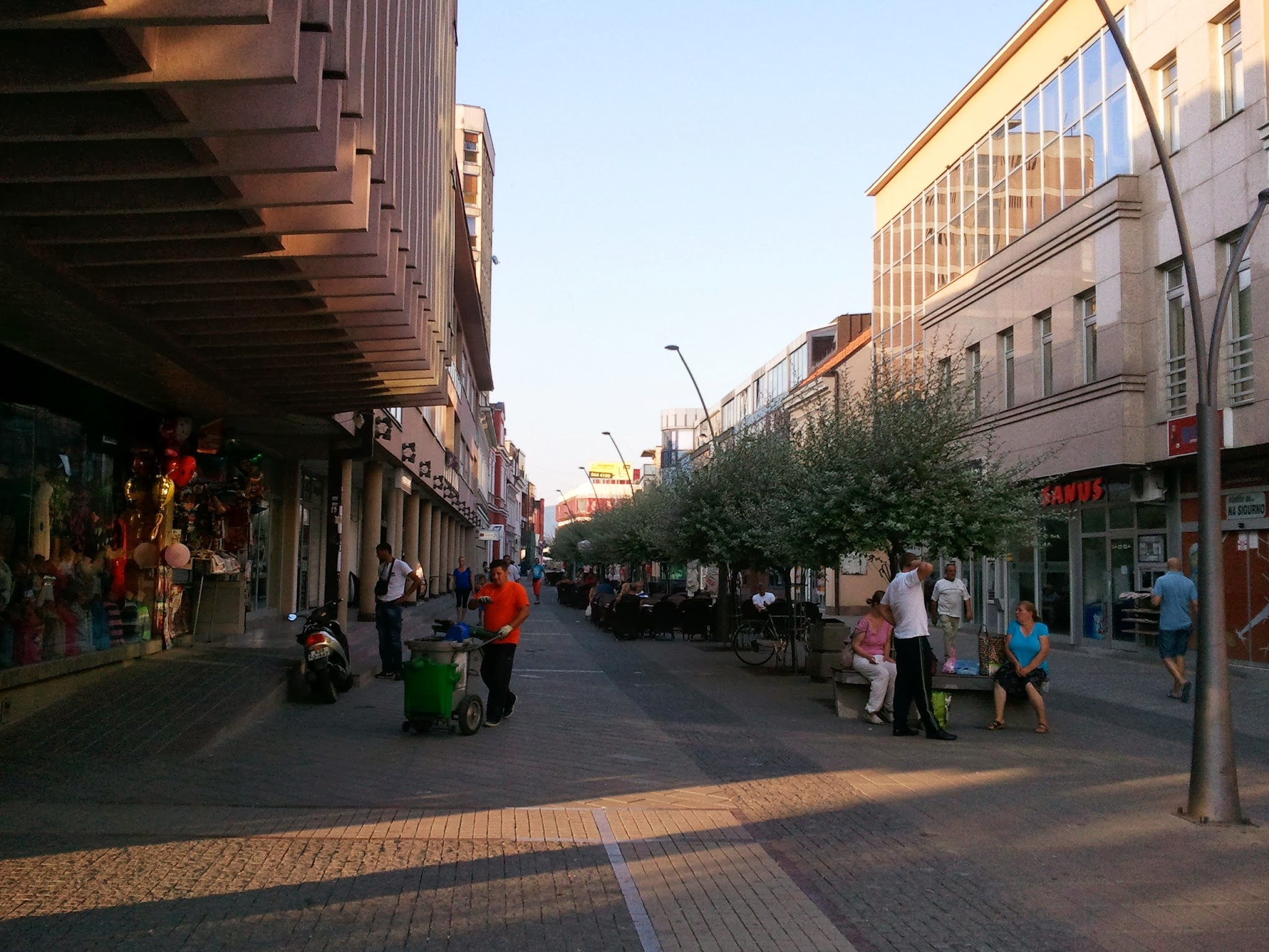 pedestrian street, city centre, prijedor